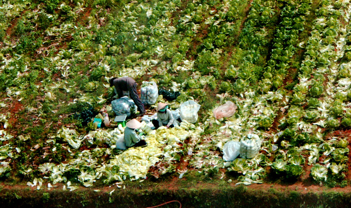 Cabbage fields, Da Lat